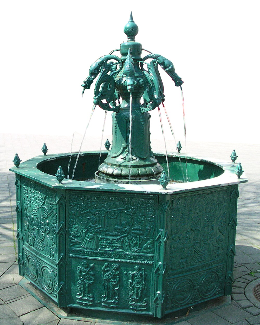 Aachen Haaren, Brunnen am Platz vor der rk. Pfarrkirche “St. Germanus”